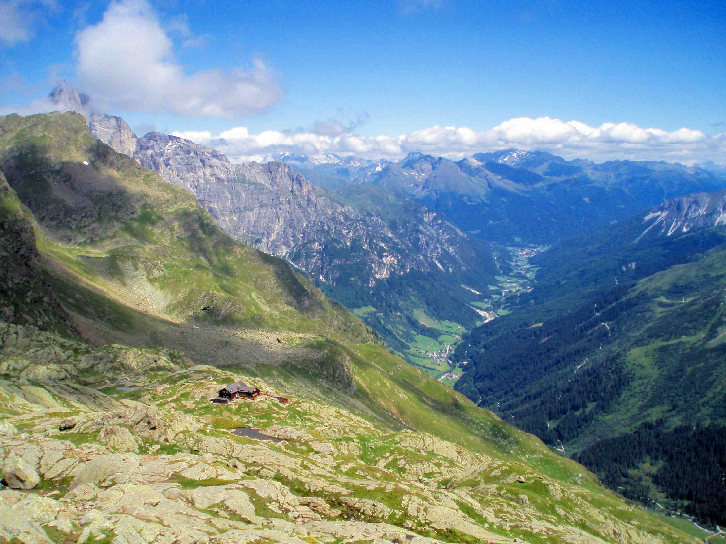 Blick auf die Magdeburger Hütte mit Tribulaun (im Hintergrund links) und Pflerschtal